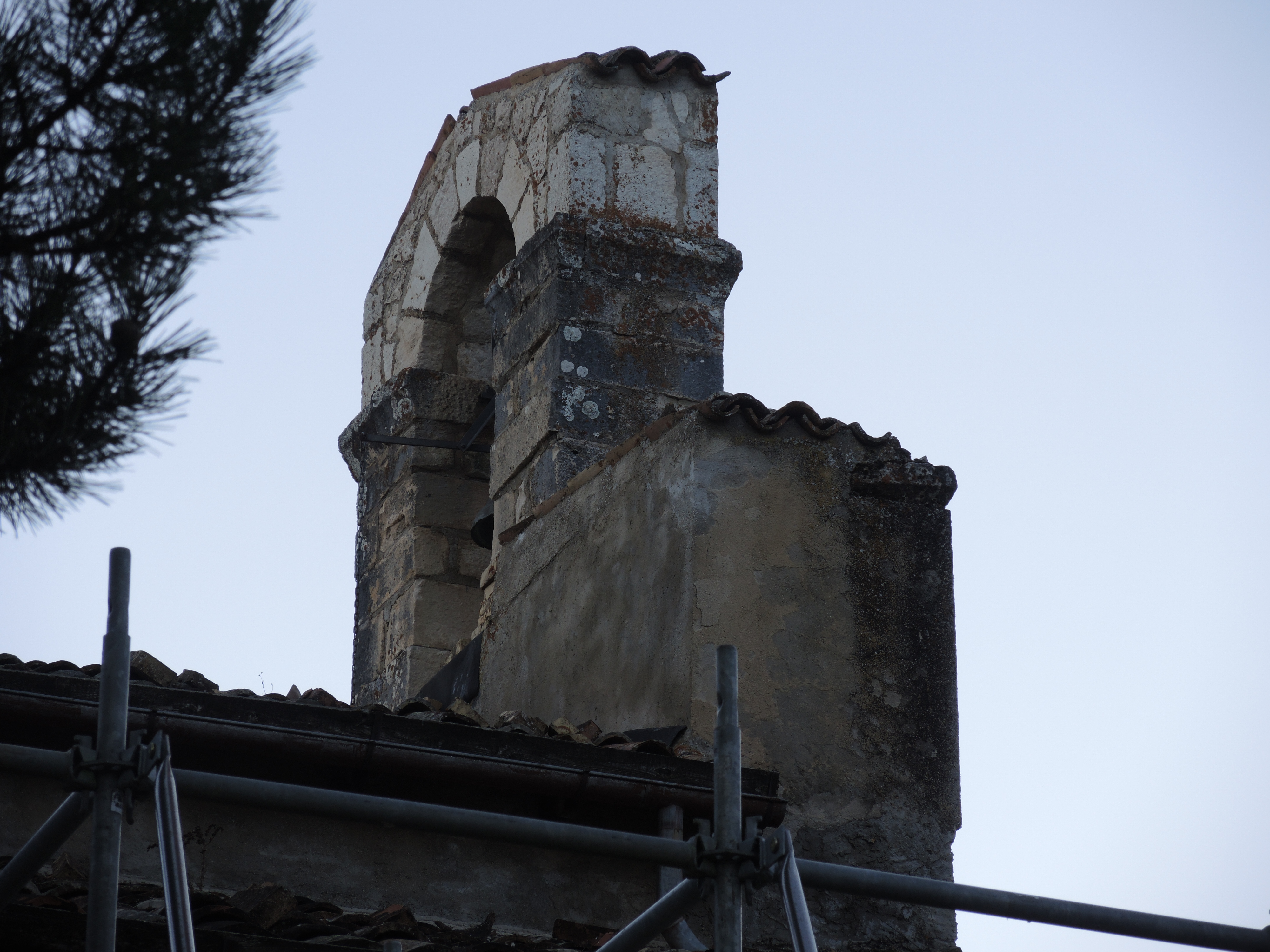 Abbazia di Santa Lucia a Rocca di Cambio (AQ)